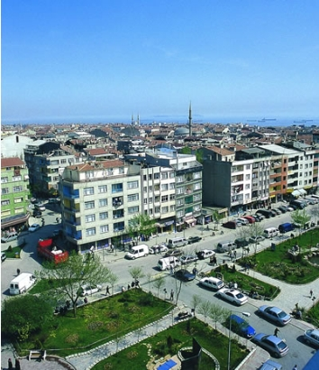 Zeytinburnu view